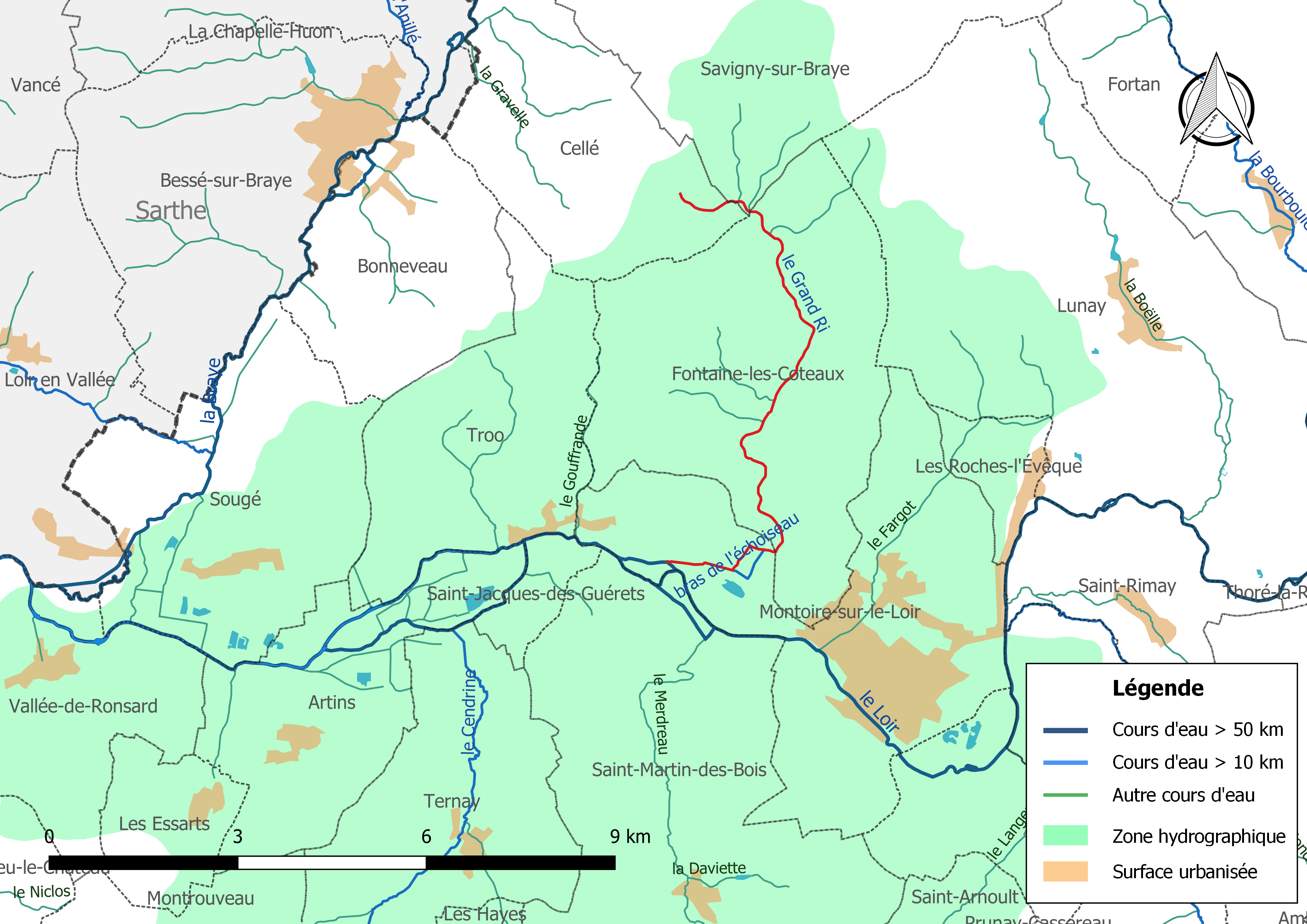 Carte du cours d'eau « le Grand Ri » et de son bassin versant (zone hydrographique dans laquelle il s'insère).